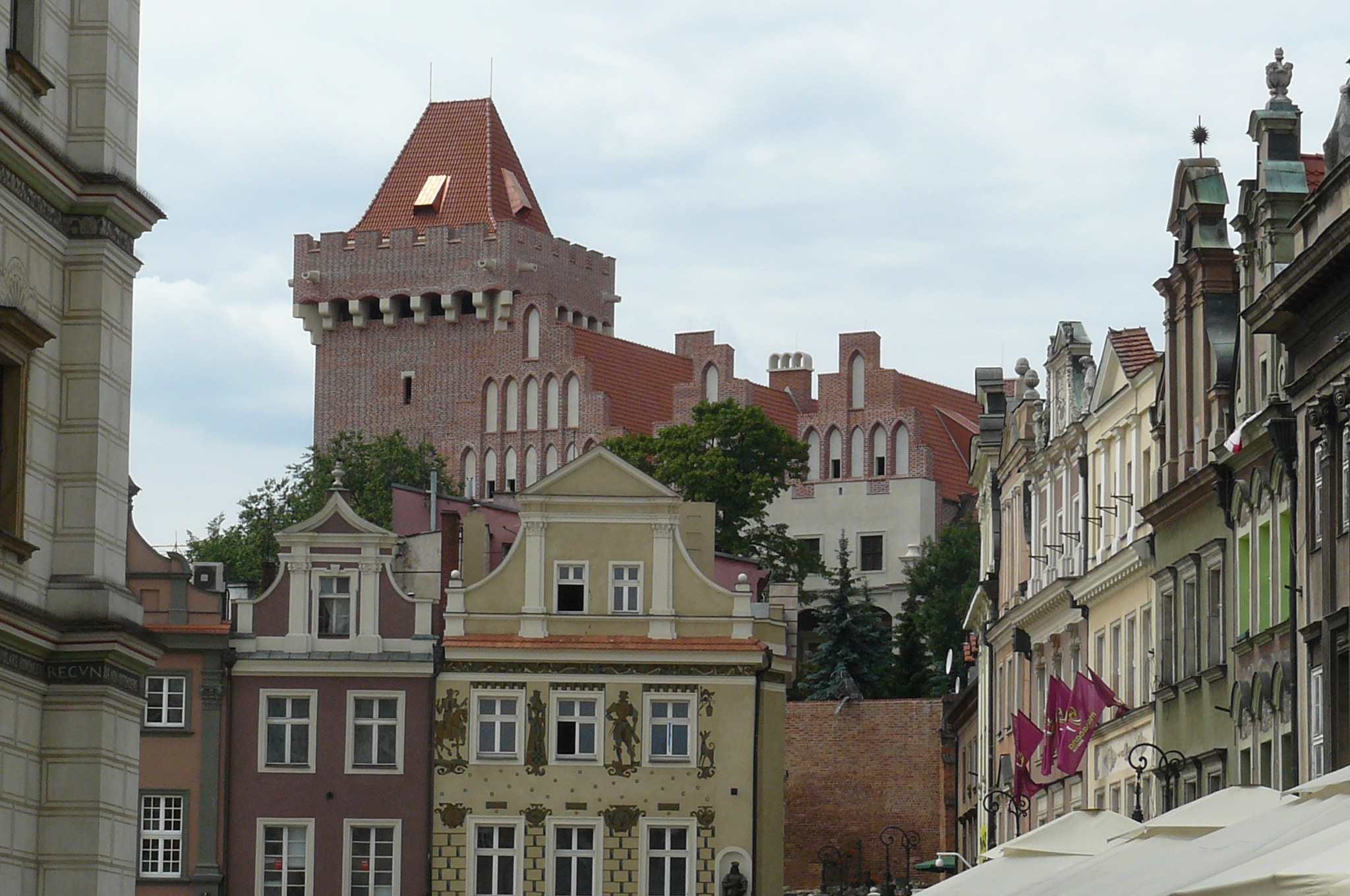 Zamek Królewski, Poznań.